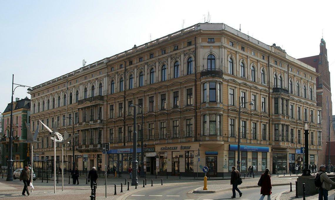 Kamienica Sachsów widziana od strony Hotelu Monopol